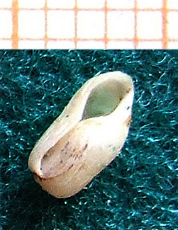 Retusa truncatula (Bruguière, 1792)